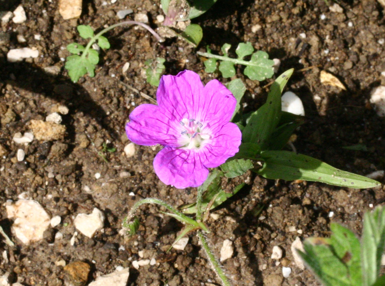 Geranio palustre - Località : Giardino Botanico Alpino "Giangio Lorenzoni", Pian Cansiglio, Tambre d'Alpago (BL), 1000 m s.l.m.